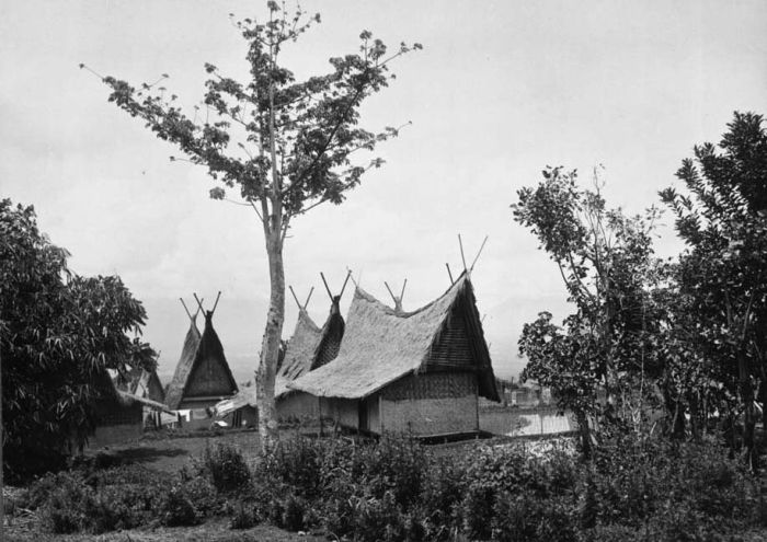 Papandak di Wanaraja, Garut